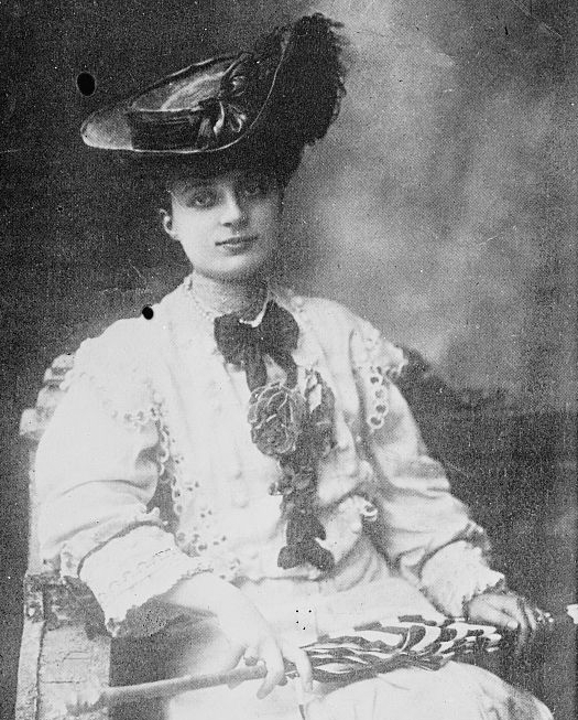 French poetess and novelist Anne de Noailles (1876-1933)